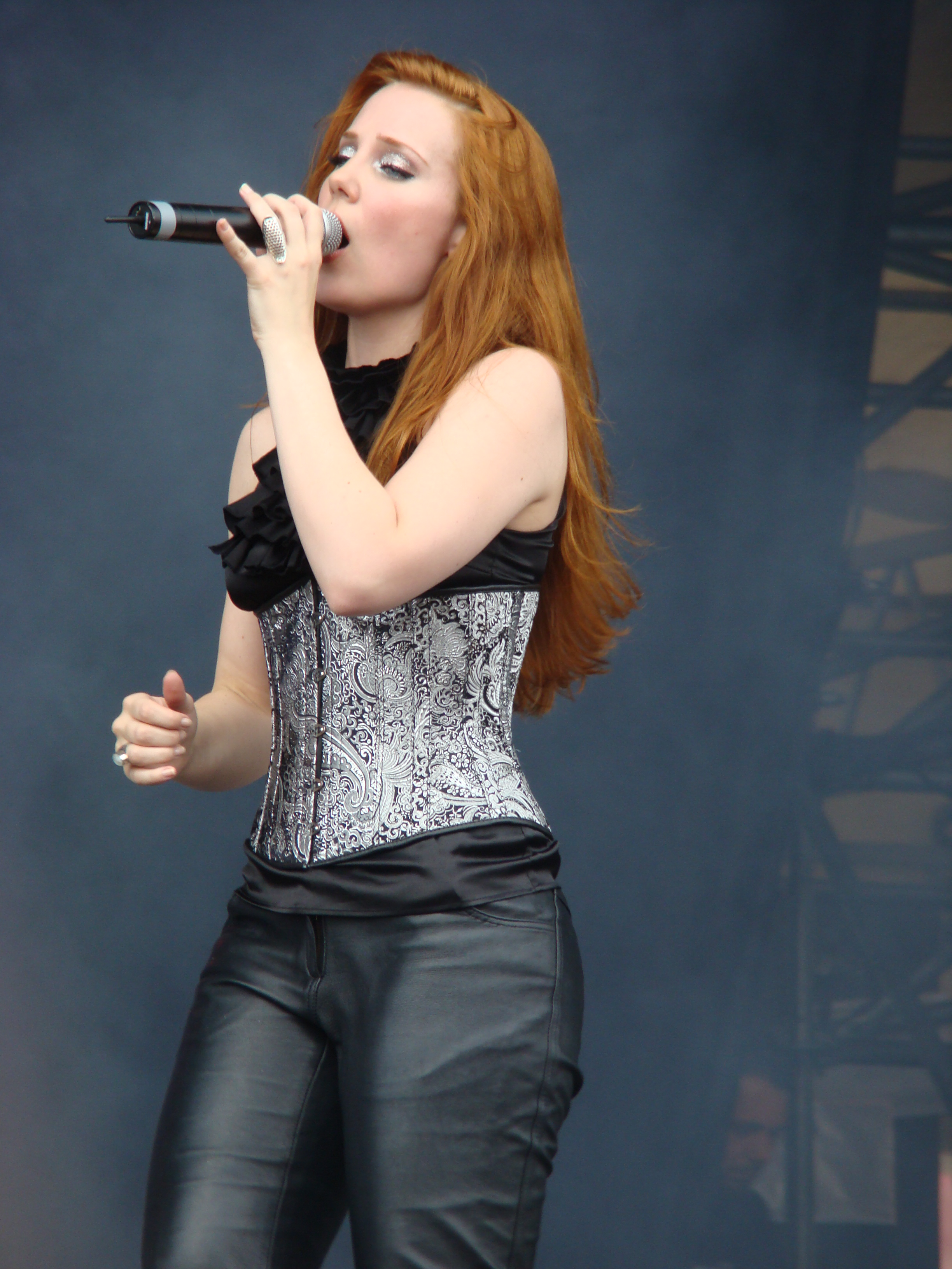 Simone Simons